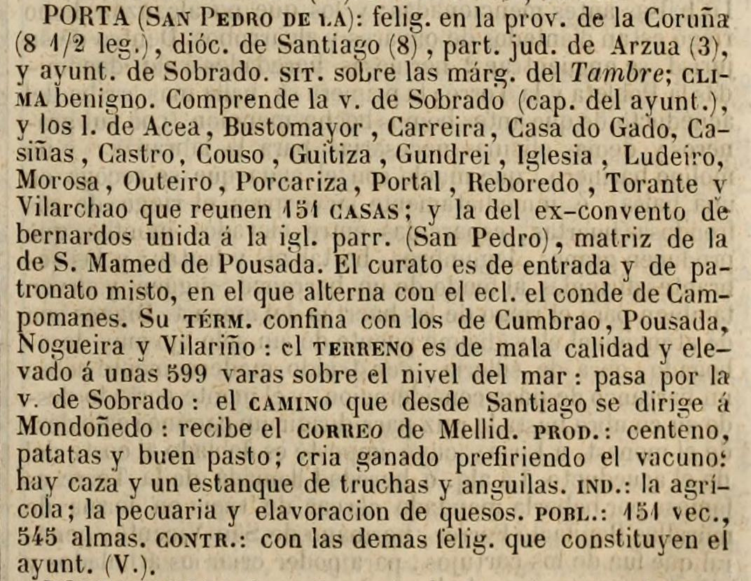 A Porta no Diccionario geográfico-estadístico-histórico de España y sus posesiones de Ultramar.